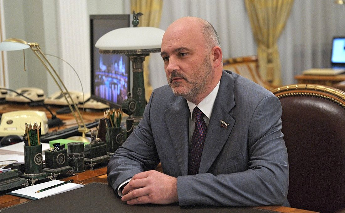 Губернатор Забайкальского края Константин Ильковский во время назначения на пост и.о. региона.